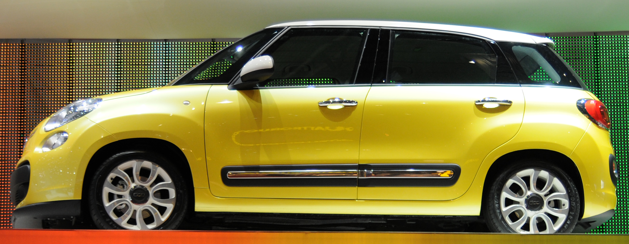 Una Fiat 500L gialla